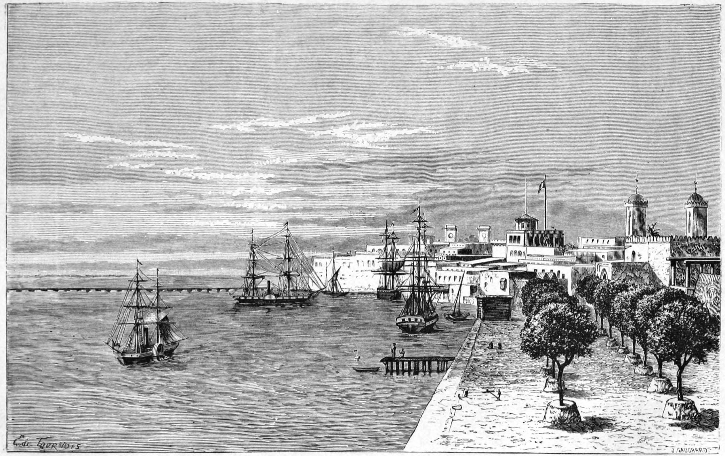 Vue de Saint-Louis, pris de la pointe du norde.